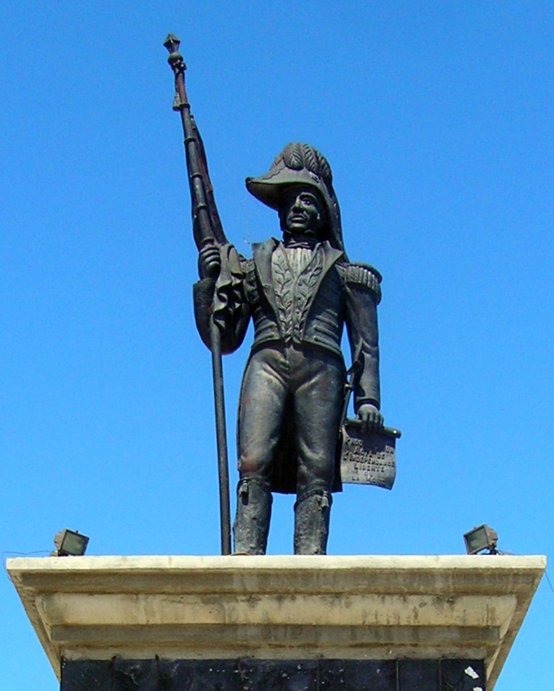 Statue de Jean-Jacques Dessalines, dirigeant de la révolution haïtienne, Cap haitien.